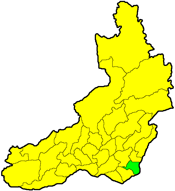 Приаргунский район на карте Забайкальского края